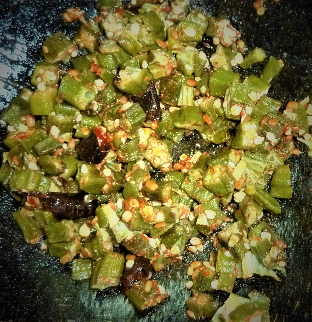 బెండకాయ పోపు కూర